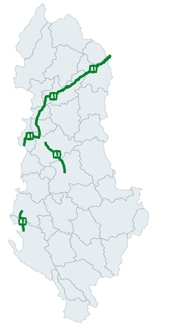 نقشه آزادراههای آلبانی